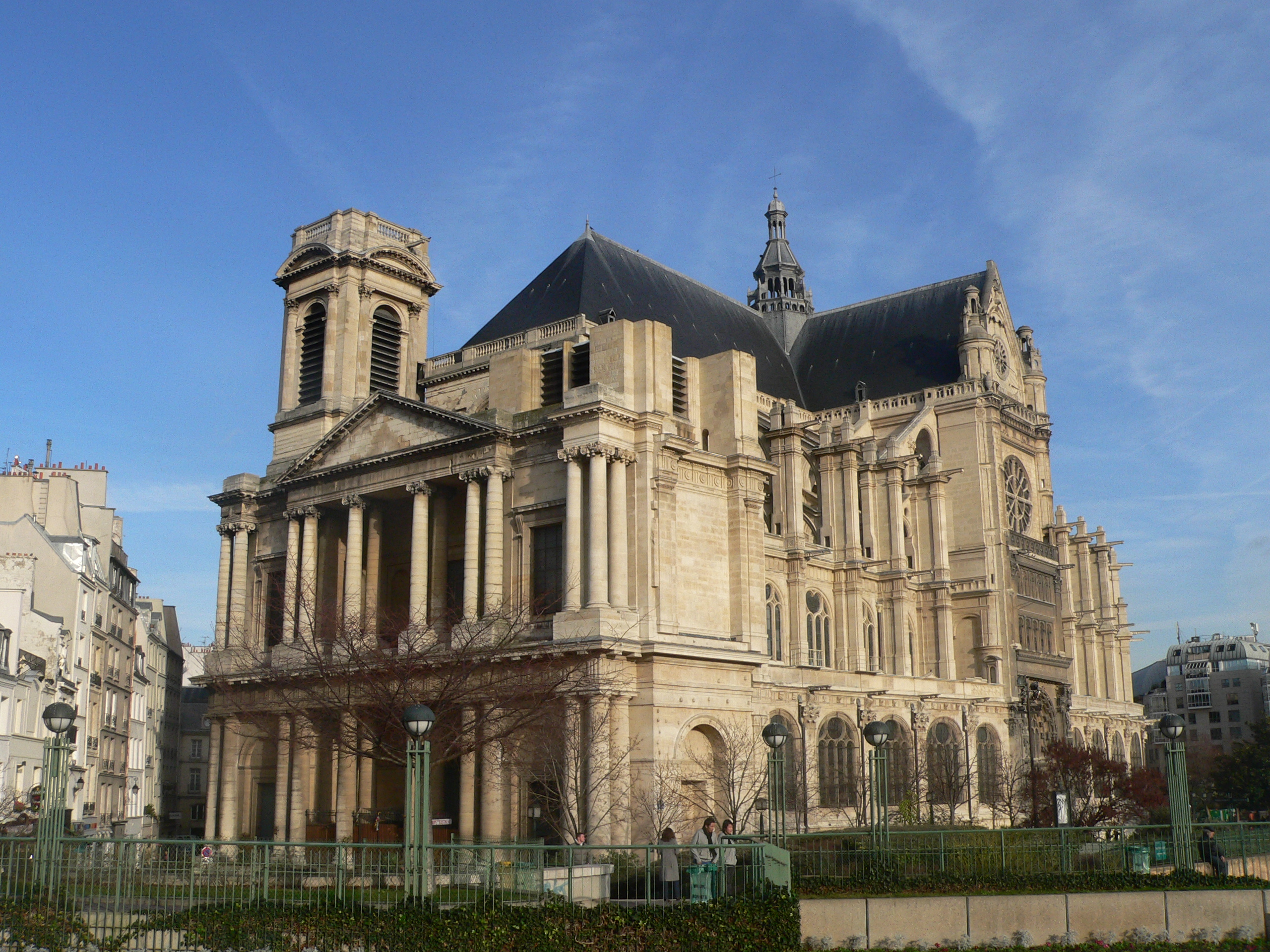 St-Eustache 2006 David Monniaux